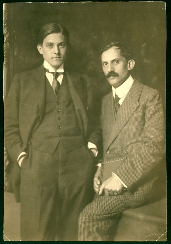 Aladár Komjáthy and Mihály Babits. Photograph by Aladár Székely